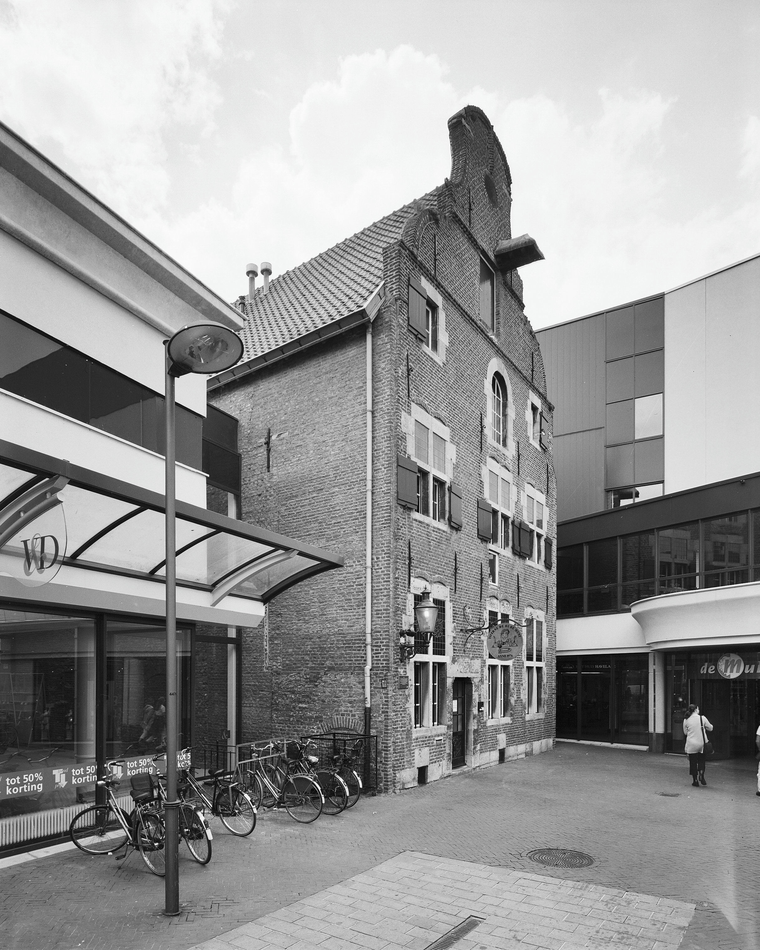 Voormalig Muntgebouw: Overzicht voorgevel en gedeelte linker zijgevel (opmerking: Gefotografeerd voor Monumenten In Nederland Limburg)